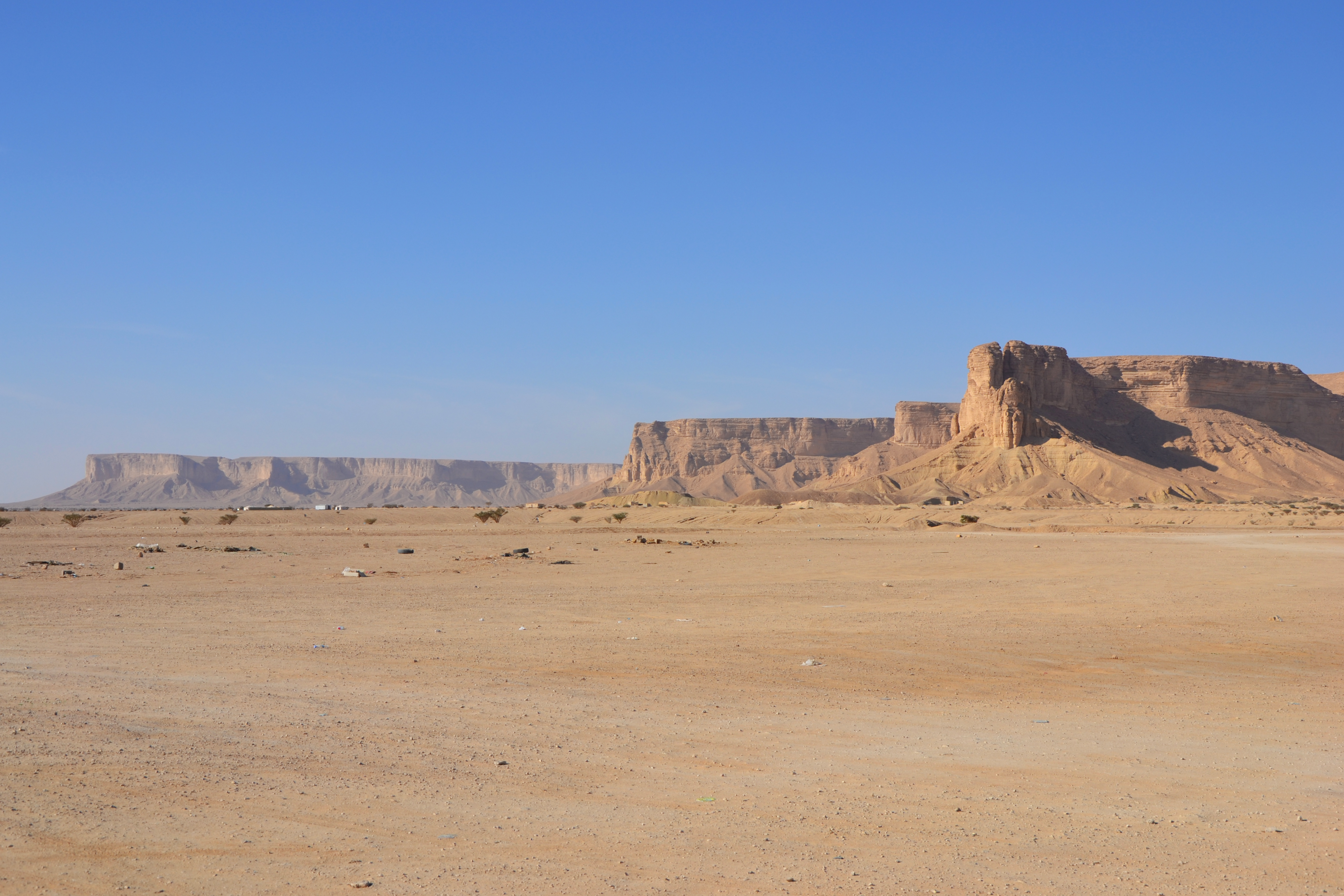 Saudi Arabia